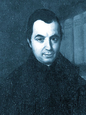 obra de dominio público.